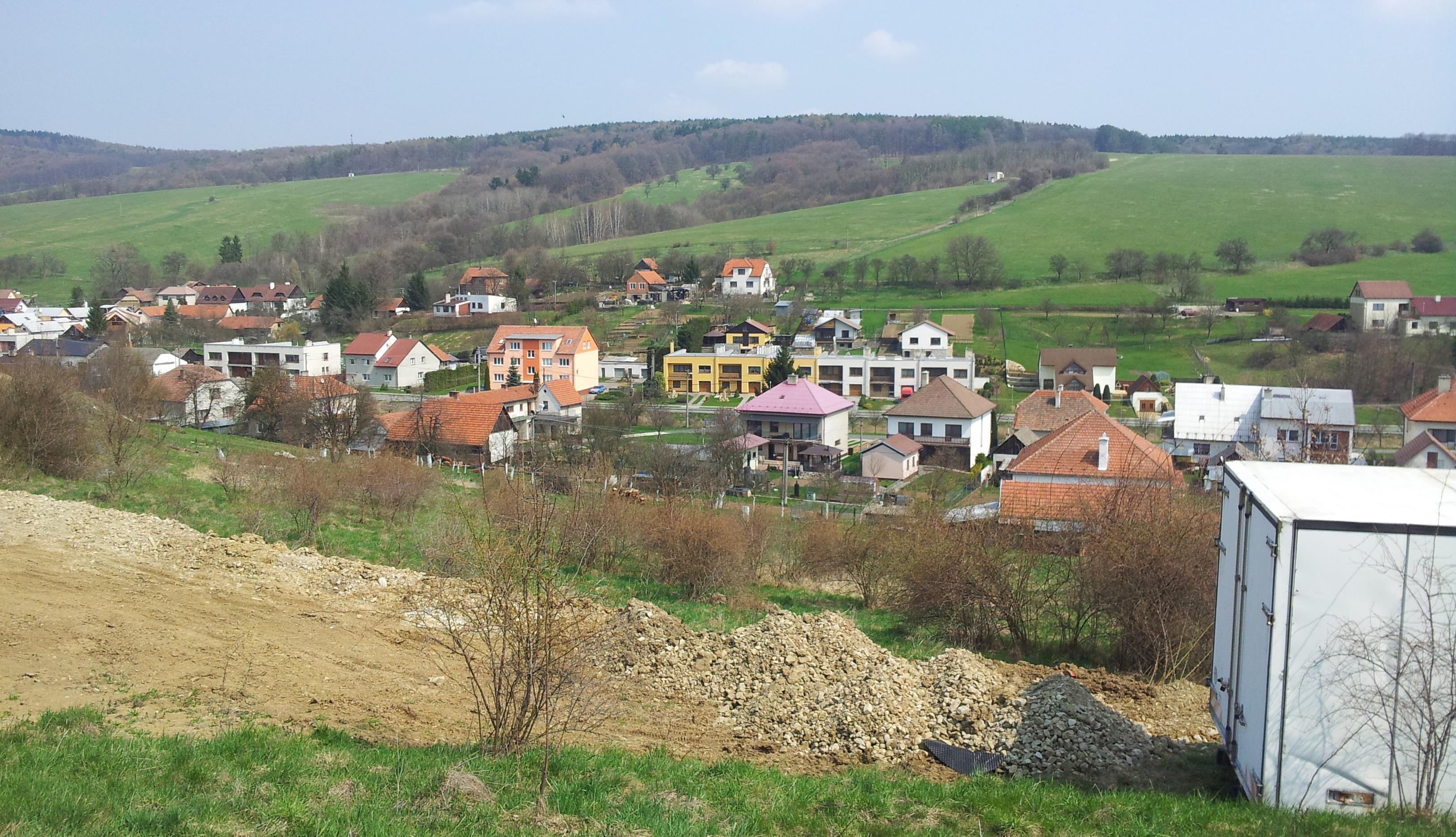 Hřivínův Újezd